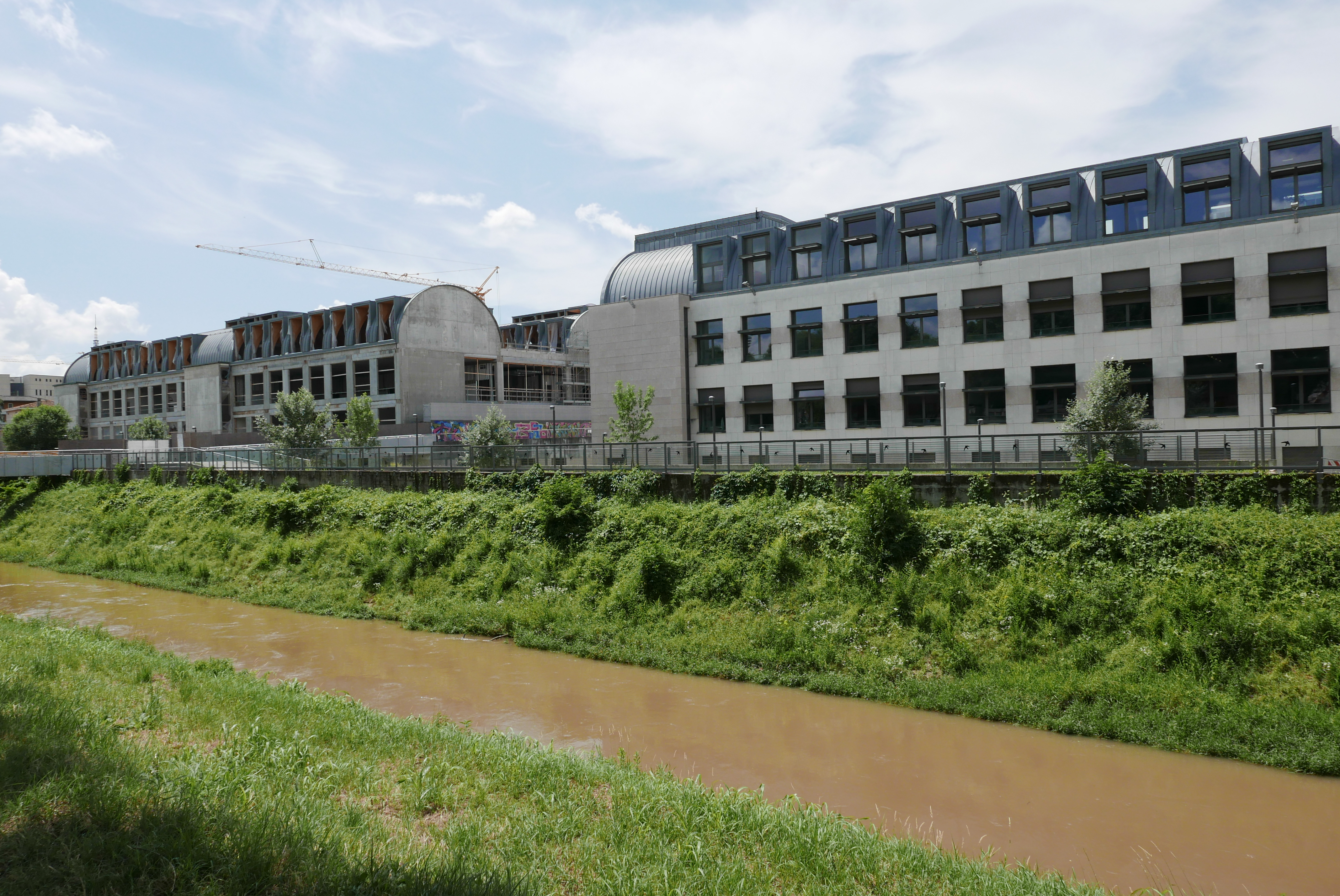 Palazzi dell'Università, in Borgo Berga a Vicenza